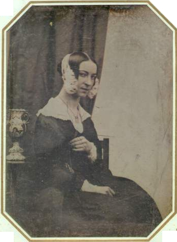 Therese Staufenau geb. Gauß. File:Therese Staufenau geb. Gauß, 005.jpg ohne Rahmen.